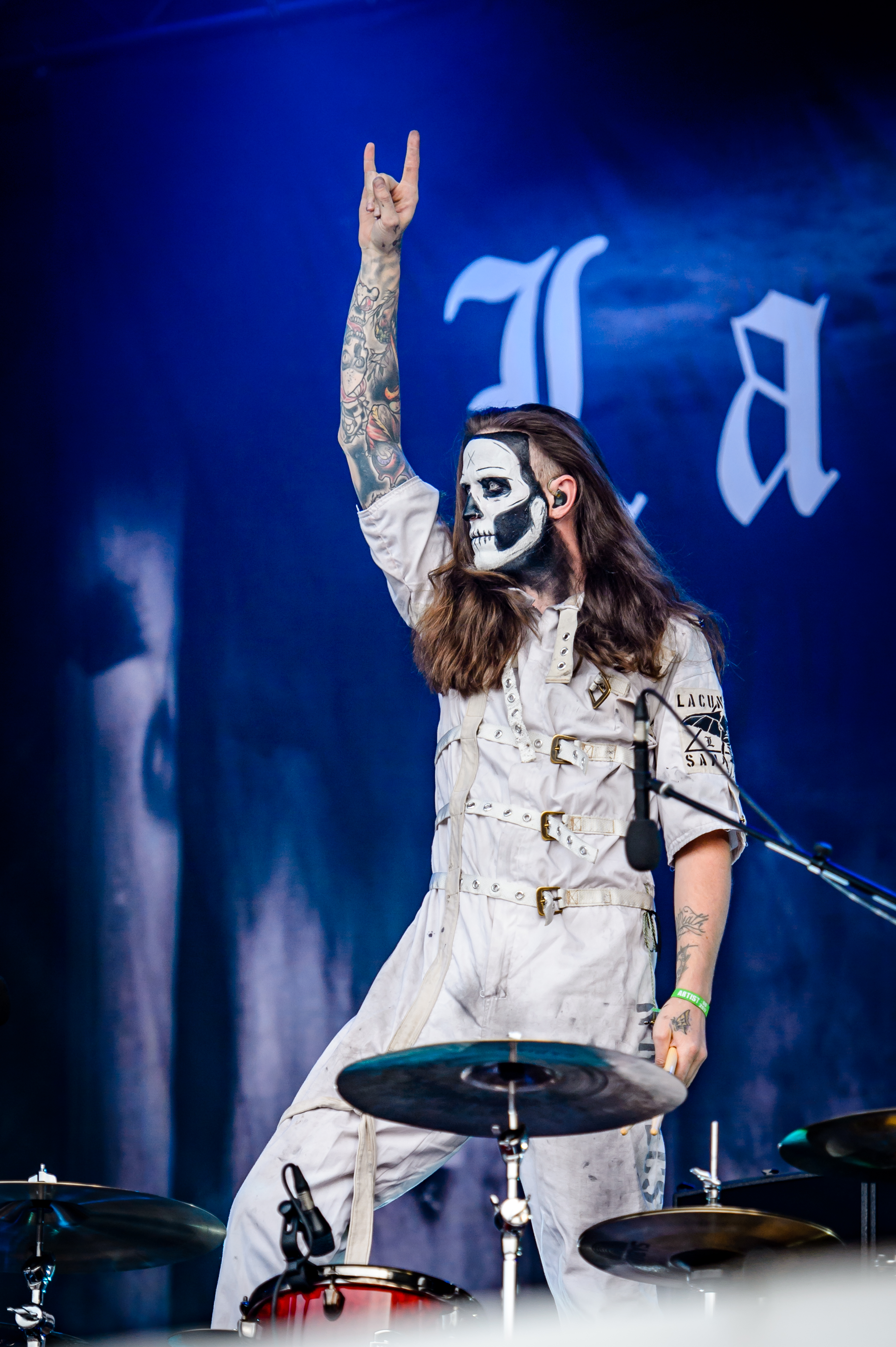 'RockHarz Open Air 2017; Ballenstedt': 'Lacuna Coil'